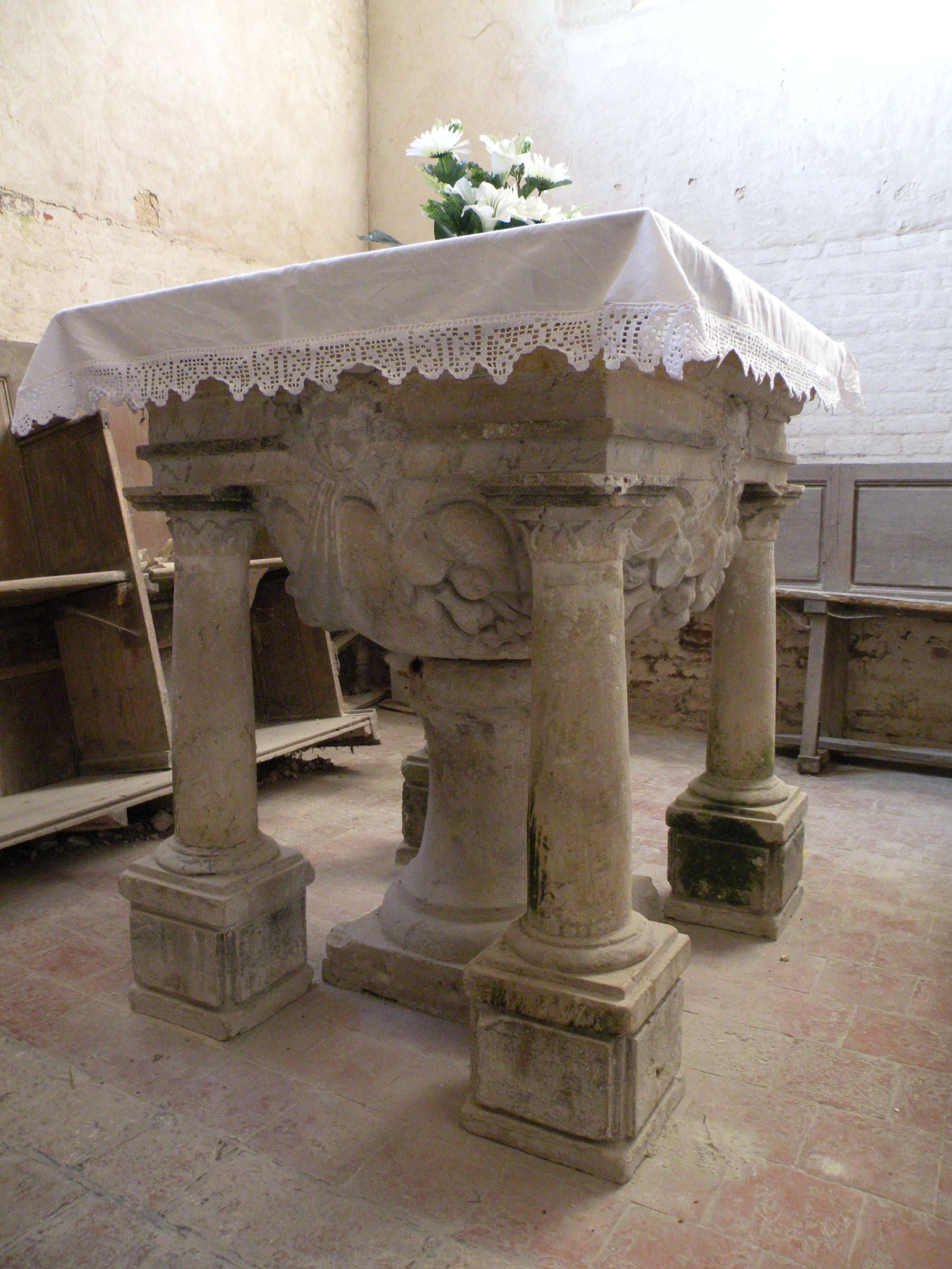 Intérieur de l'église Saint-Crépin-et-Saint-Crépinien de Saint-Crépin-Ibouvillers, fonts baptismaux.